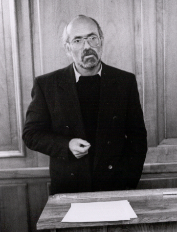 Jürg Frischknecht, Schweizer Journalist. Bildausschnitt